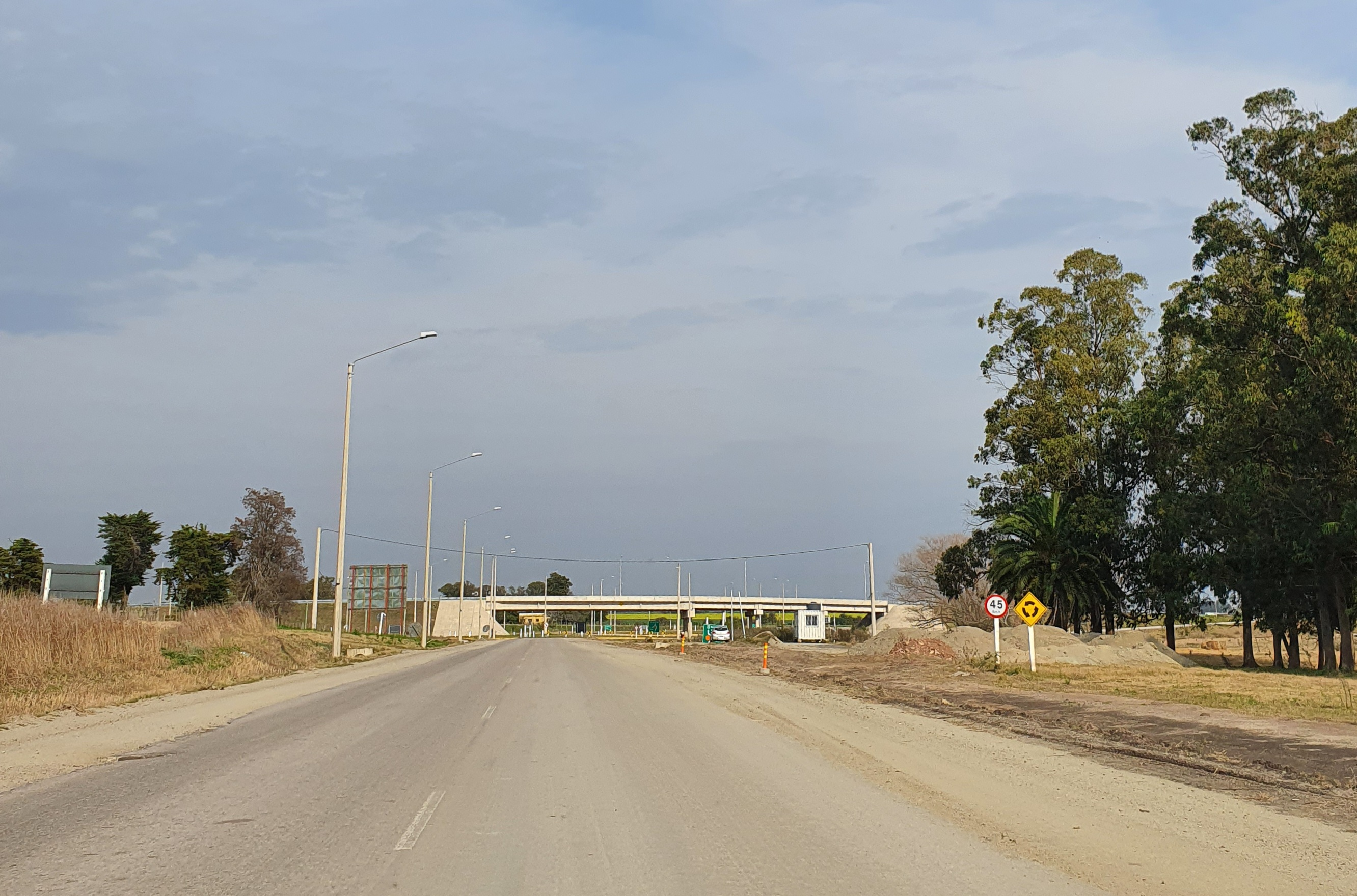 Ruta 55 en reparación, 2020, próximo al intercambiador de ruta 21.